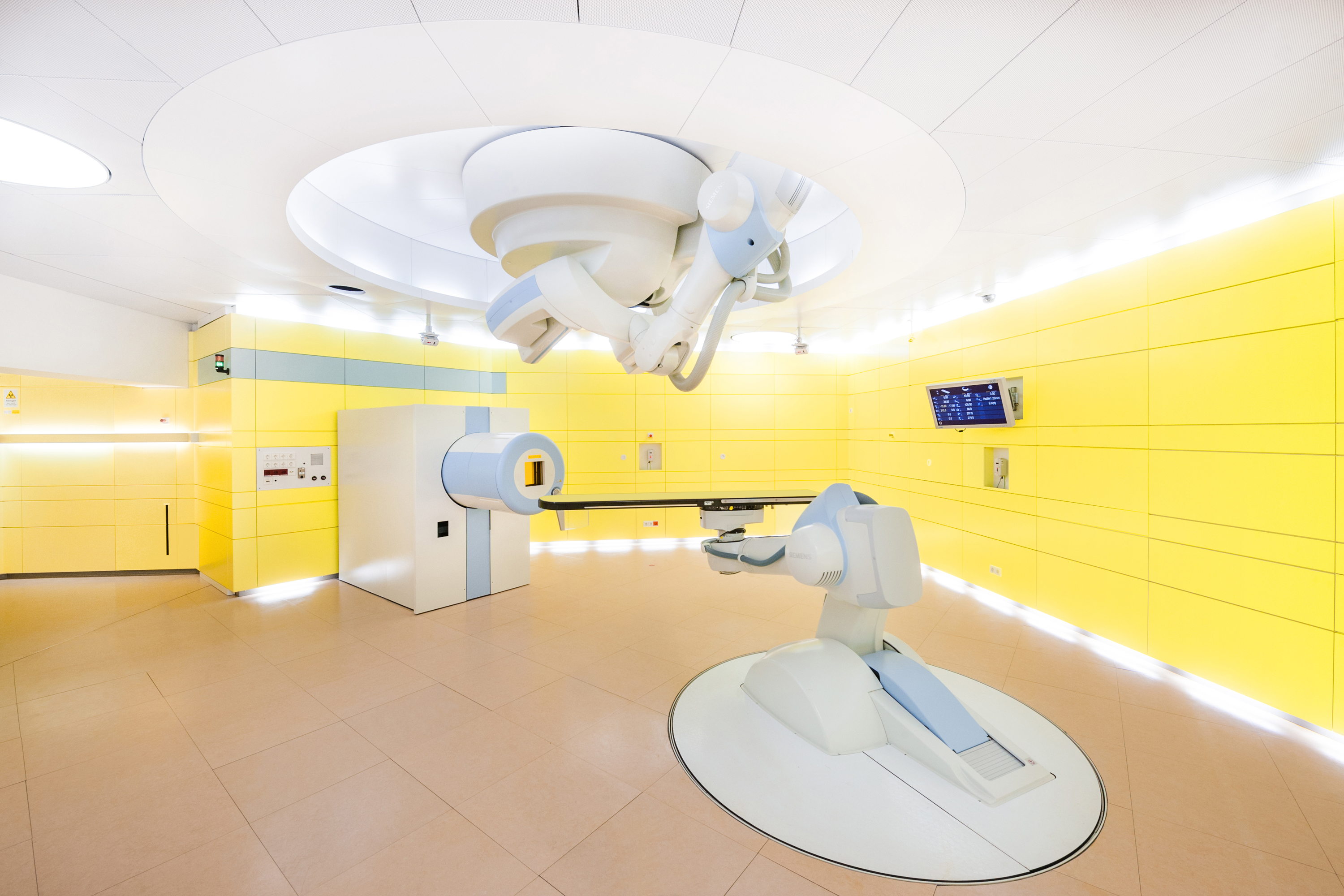 Behandlungsraum am MIT